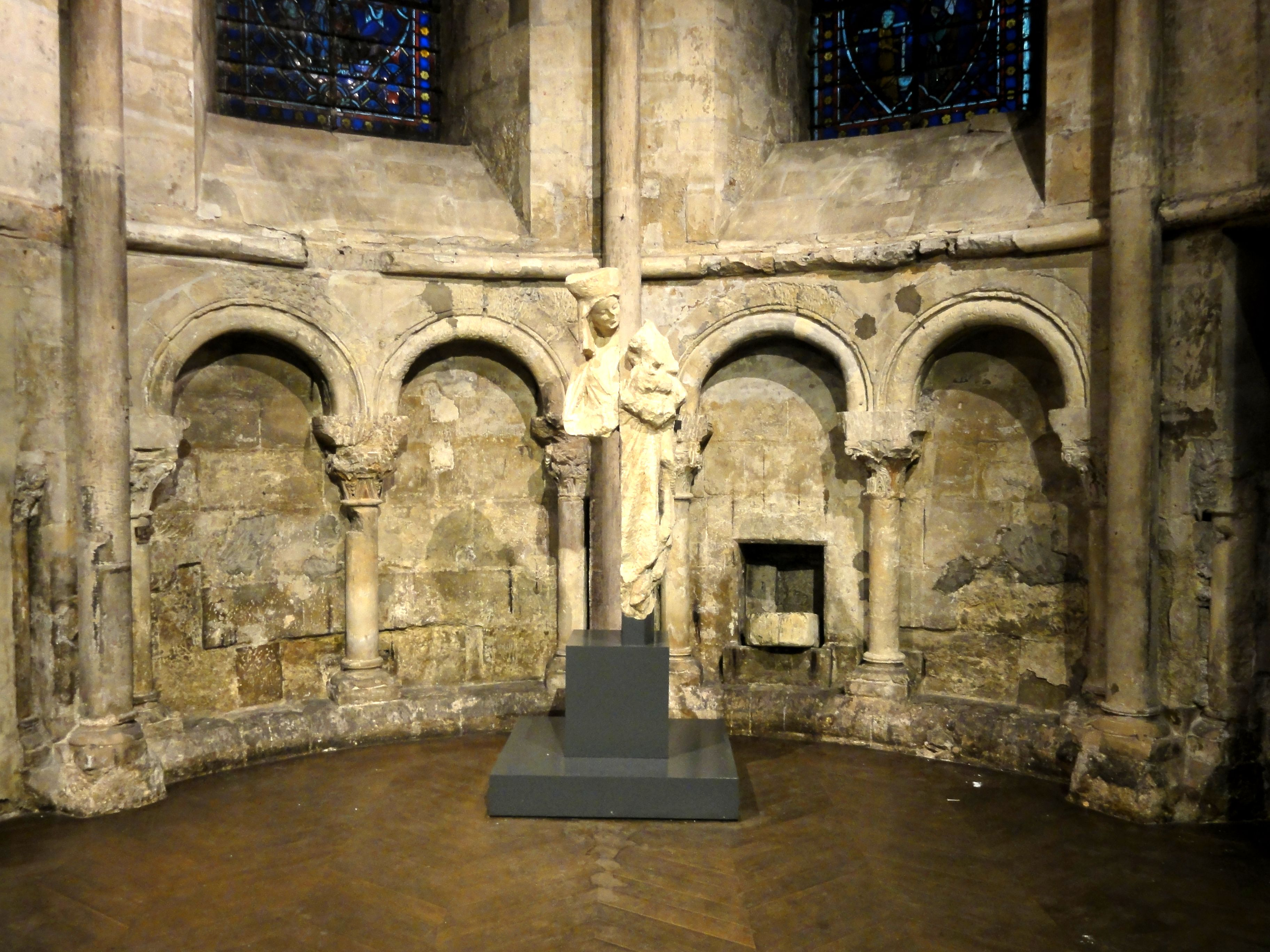 Chapelle Ste-Geneviève (seconde chapelle rayonnante au sud).